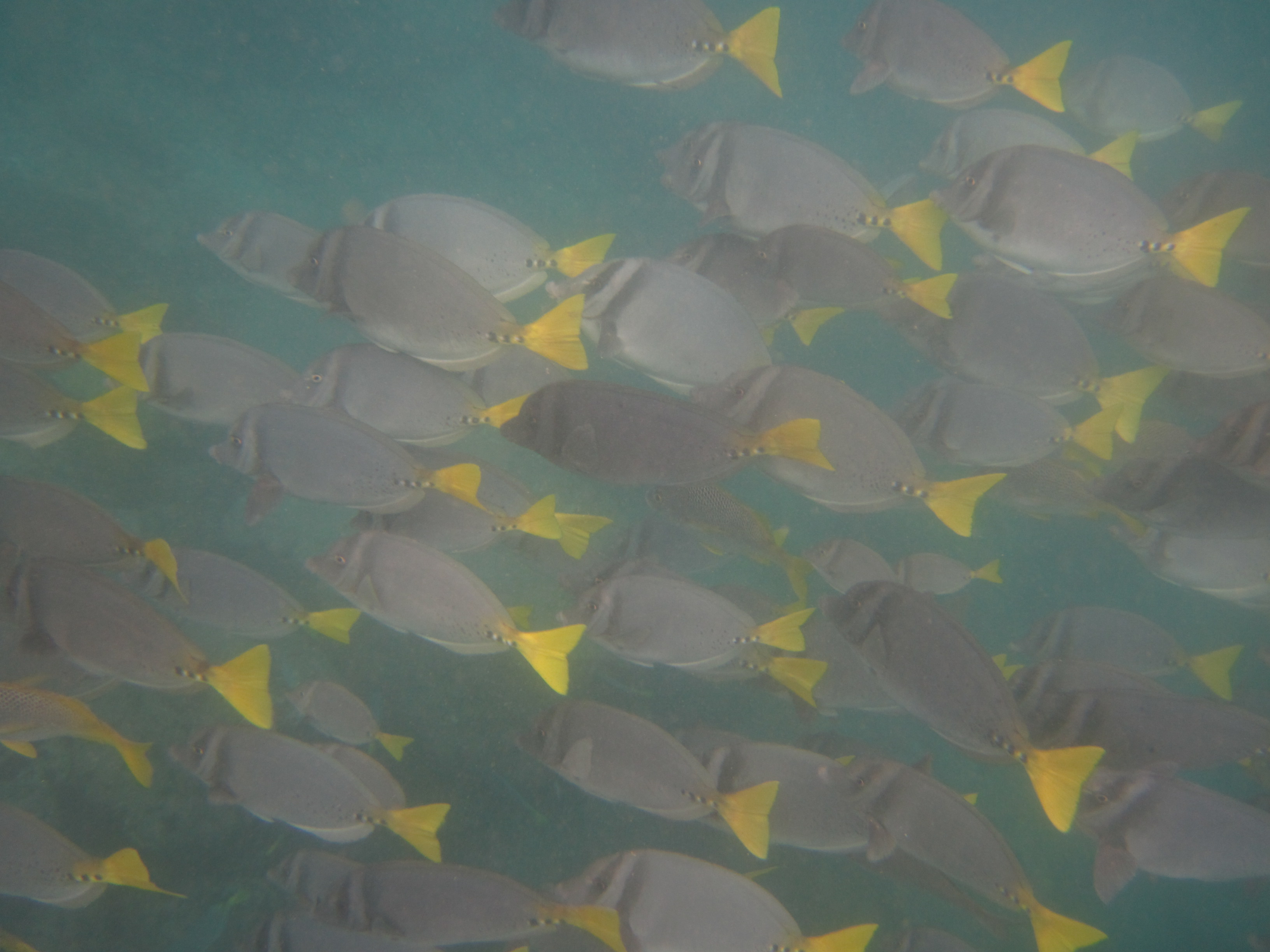 Cardumen de Prionurus laticlavius, Galápagos, Ecuador